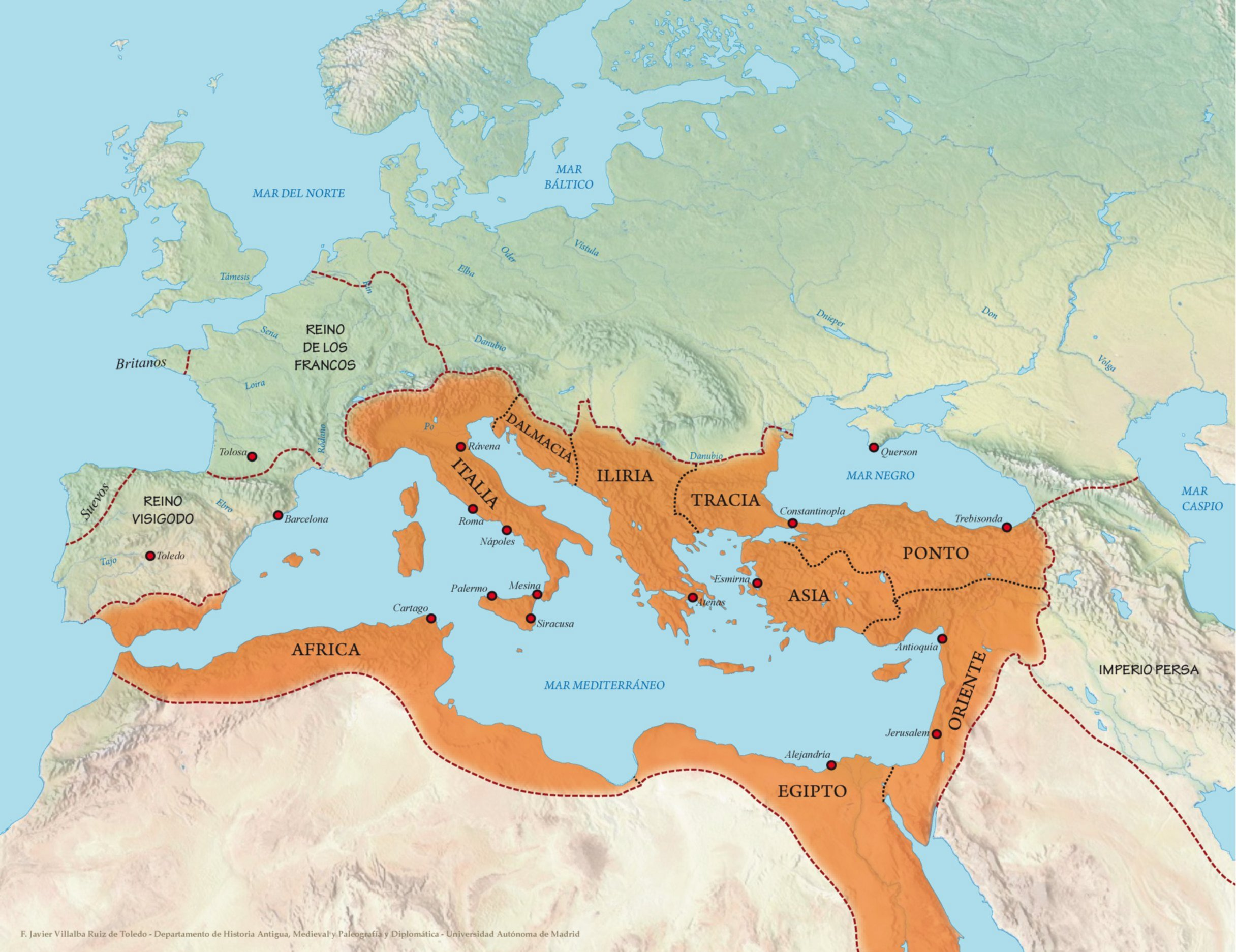 Imperio Bizantino expansion